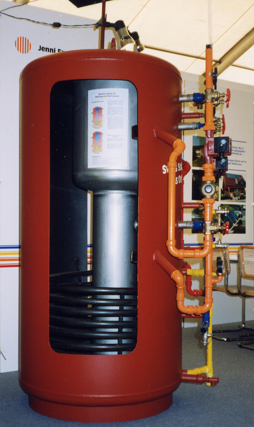 Solarspeicher aufgeschnitten